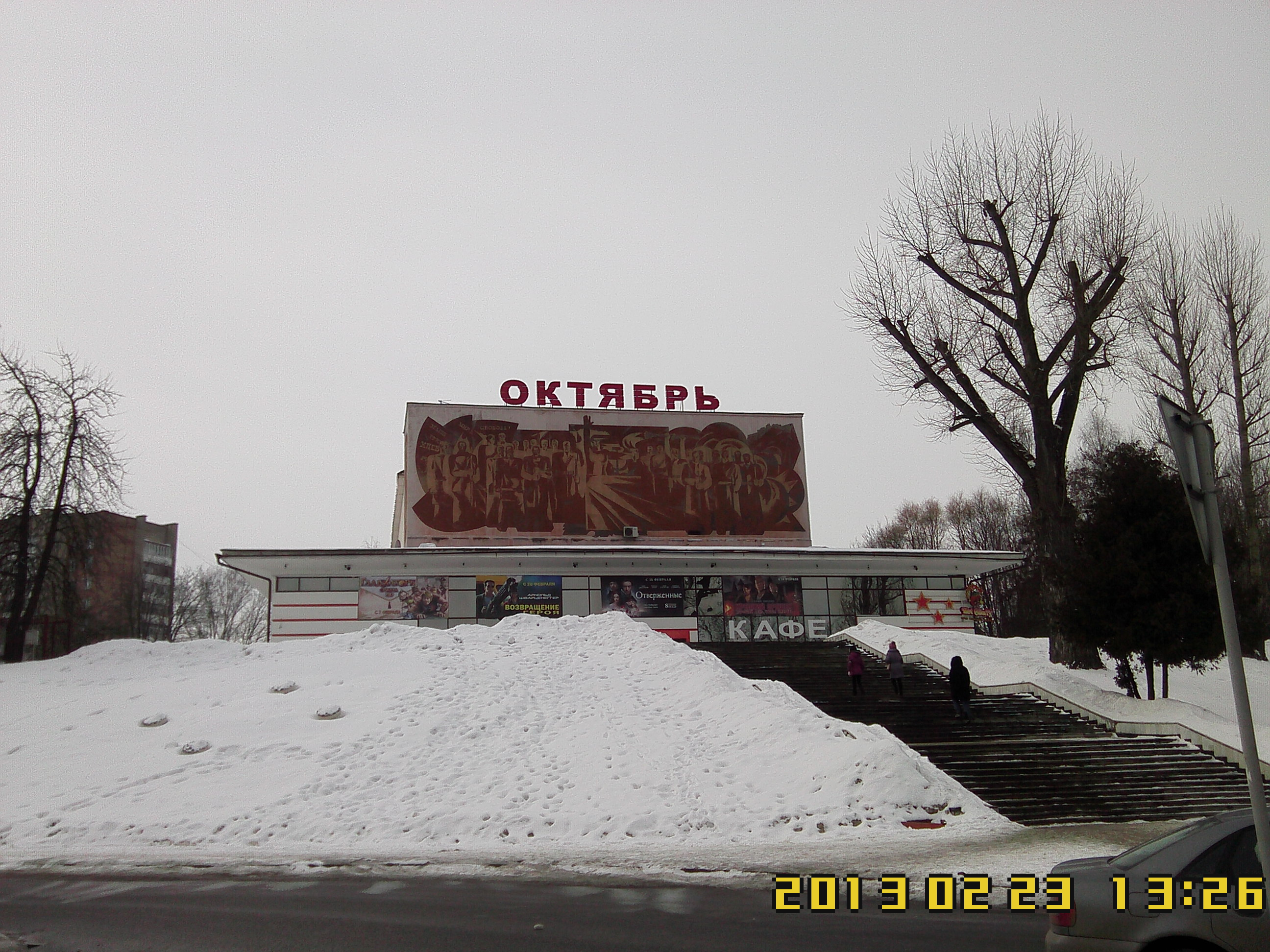 Lieninski District, Mogilev, Belarus